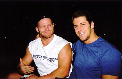 Crash Holly con Stevie Richards